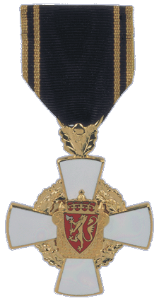 Норвежская Крест Почёта Полиции